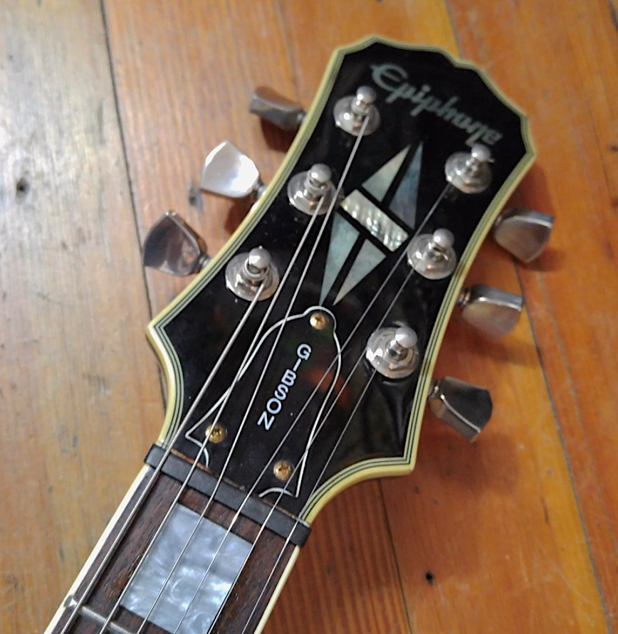 Epiphone Gibson : têtes de guitares 1989-1998